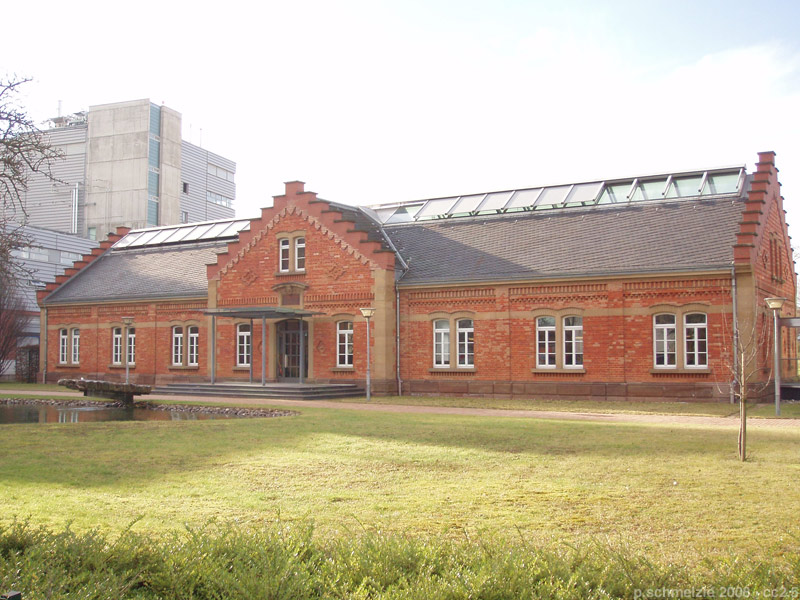 Historisches Wasserwerk in der Salzstraße in Heilbronn